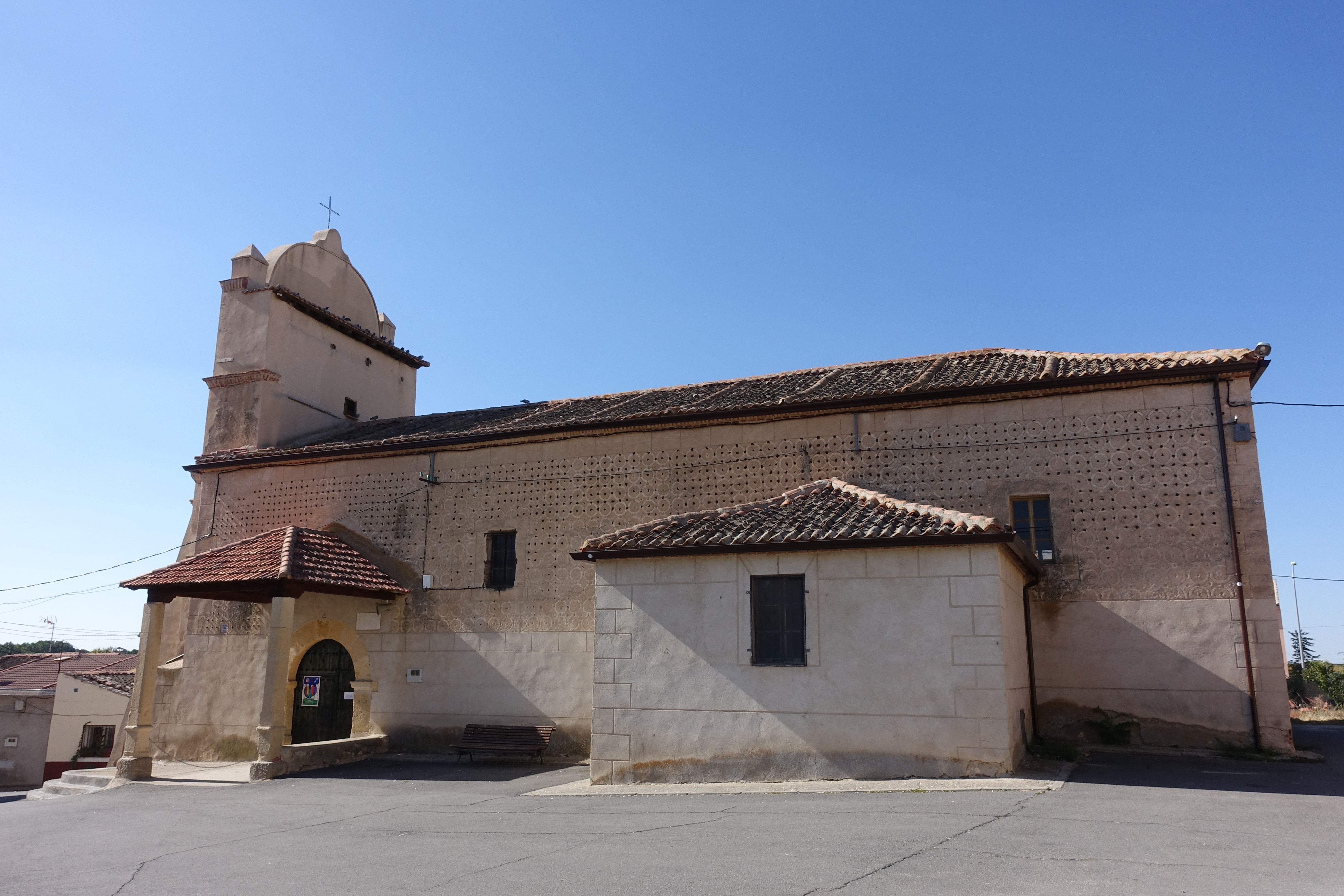 Iglesia de la Asunción, en Hontanares de Eresma (Segovia, España).